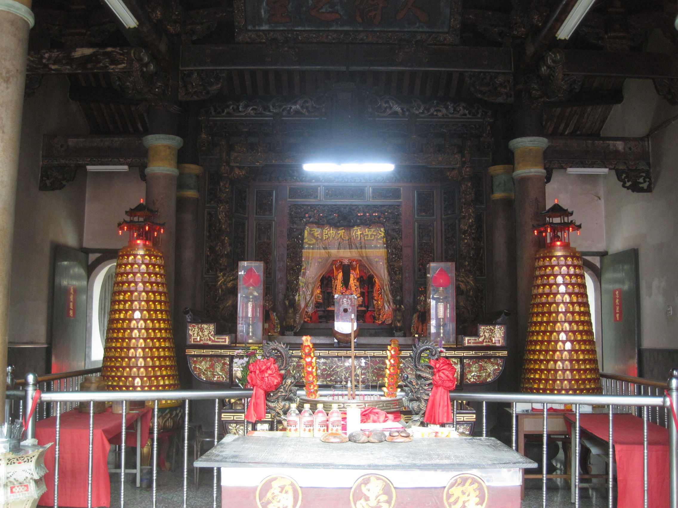 下茄苳旌忠廟正殿